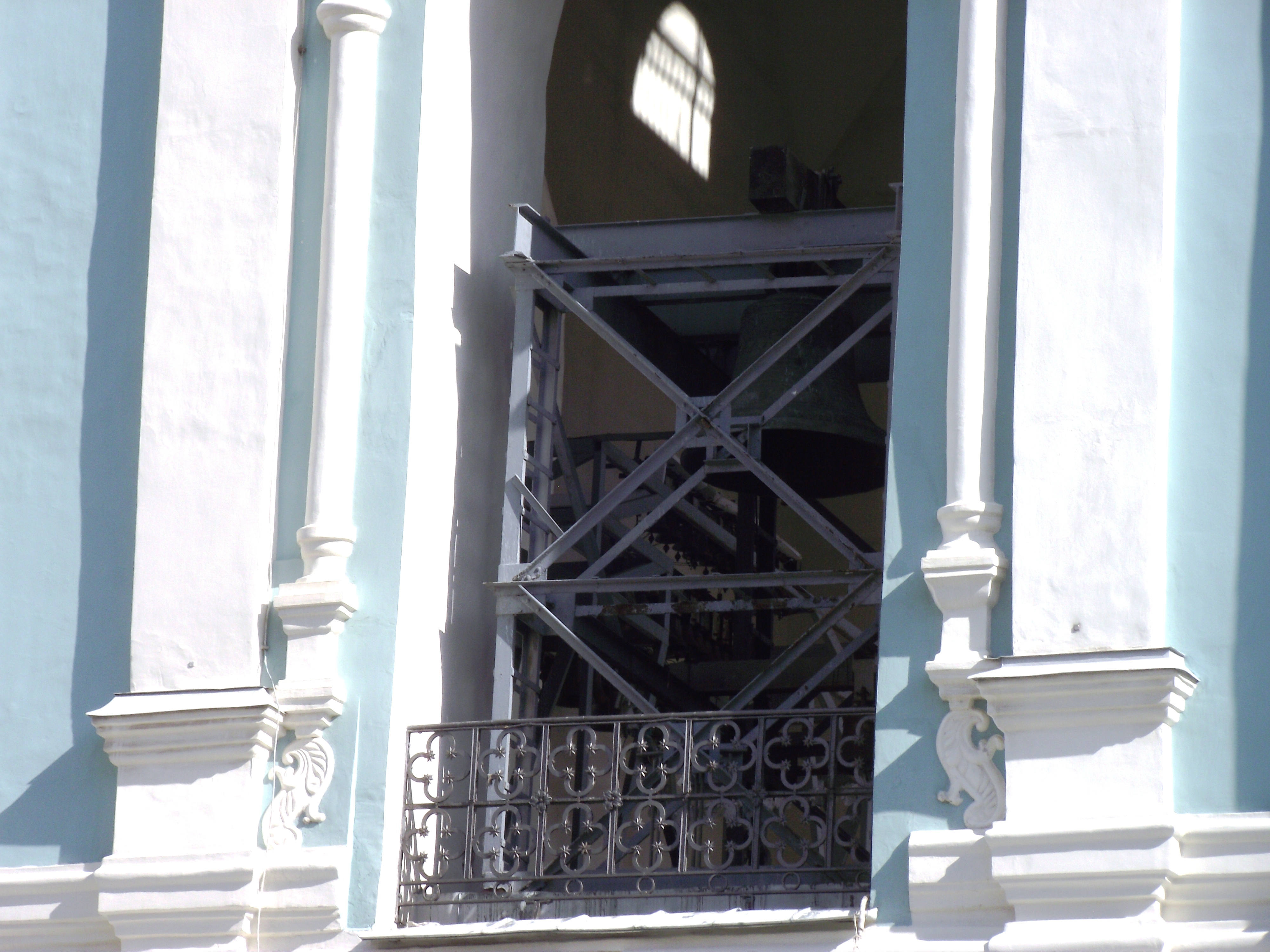 кін. ХVІІ ст., 1744–1748 (відбудова), 1851–1852 (реконструкція), 1953, 1972 (реконструкція) Дзвони.